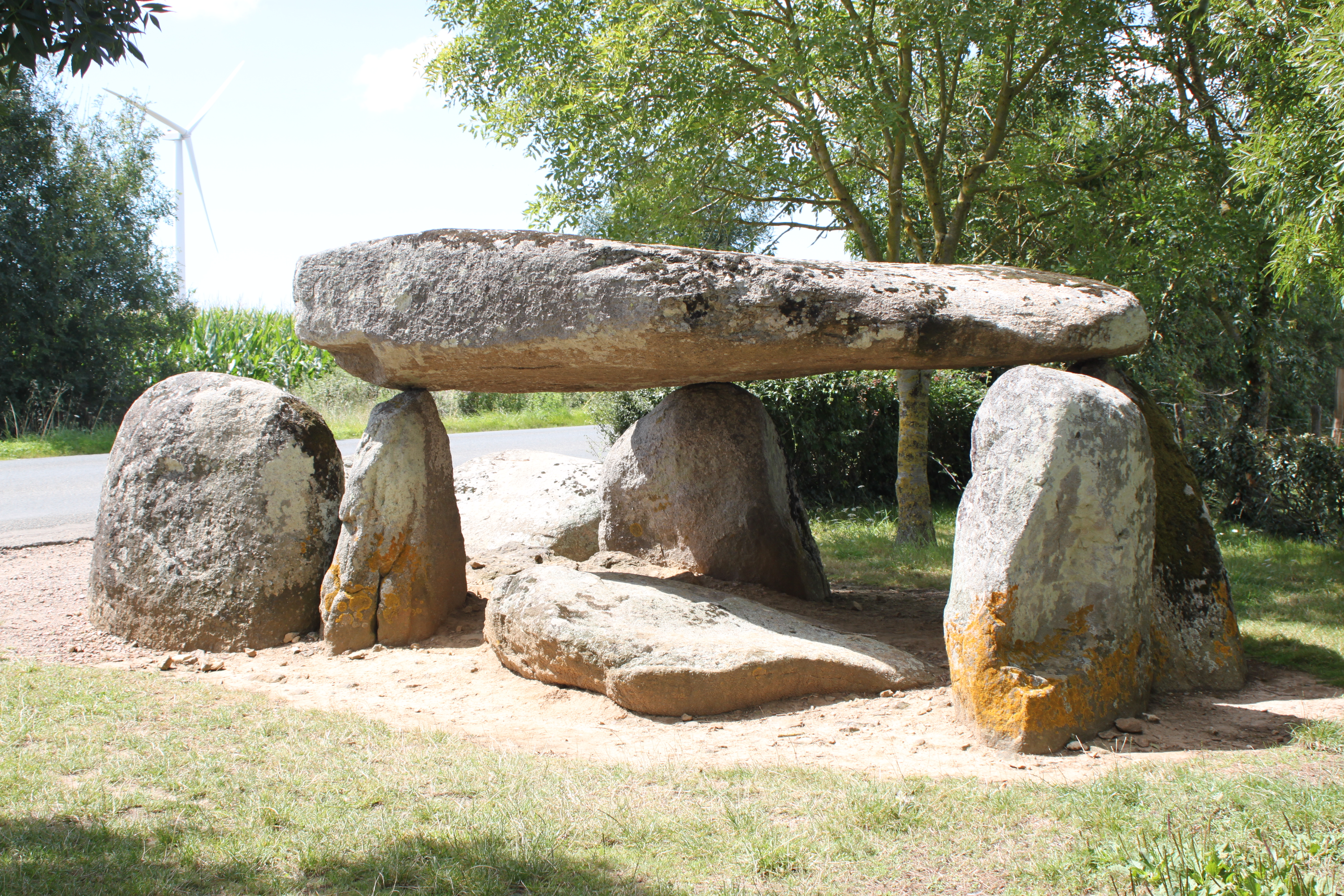 Dolmen de la Cour-du-Breuil, Fr-85-le Bernard.